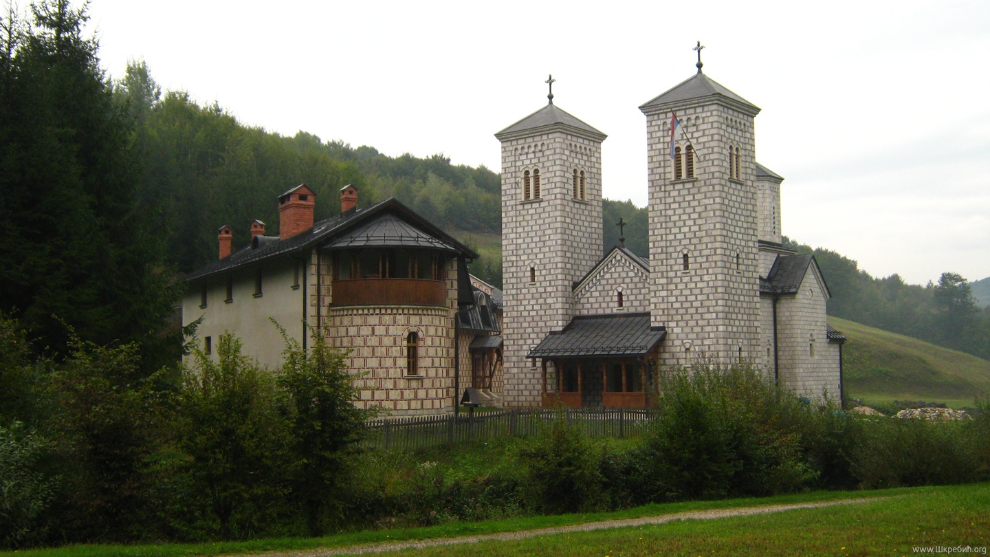 Манастир Ступље. Властита фотографија.